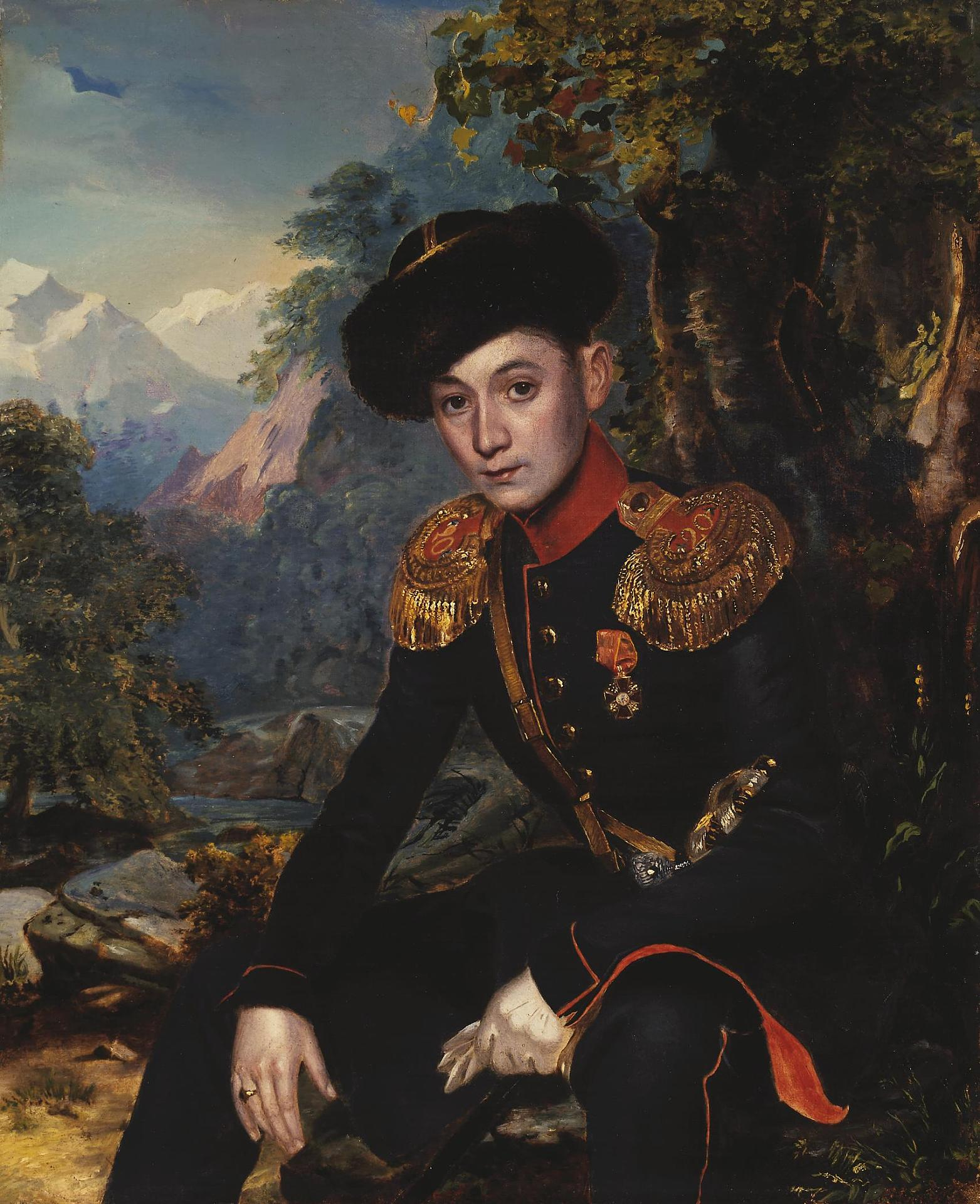 Майор Михаил Леонтьевич Дубельт (1822—1900)